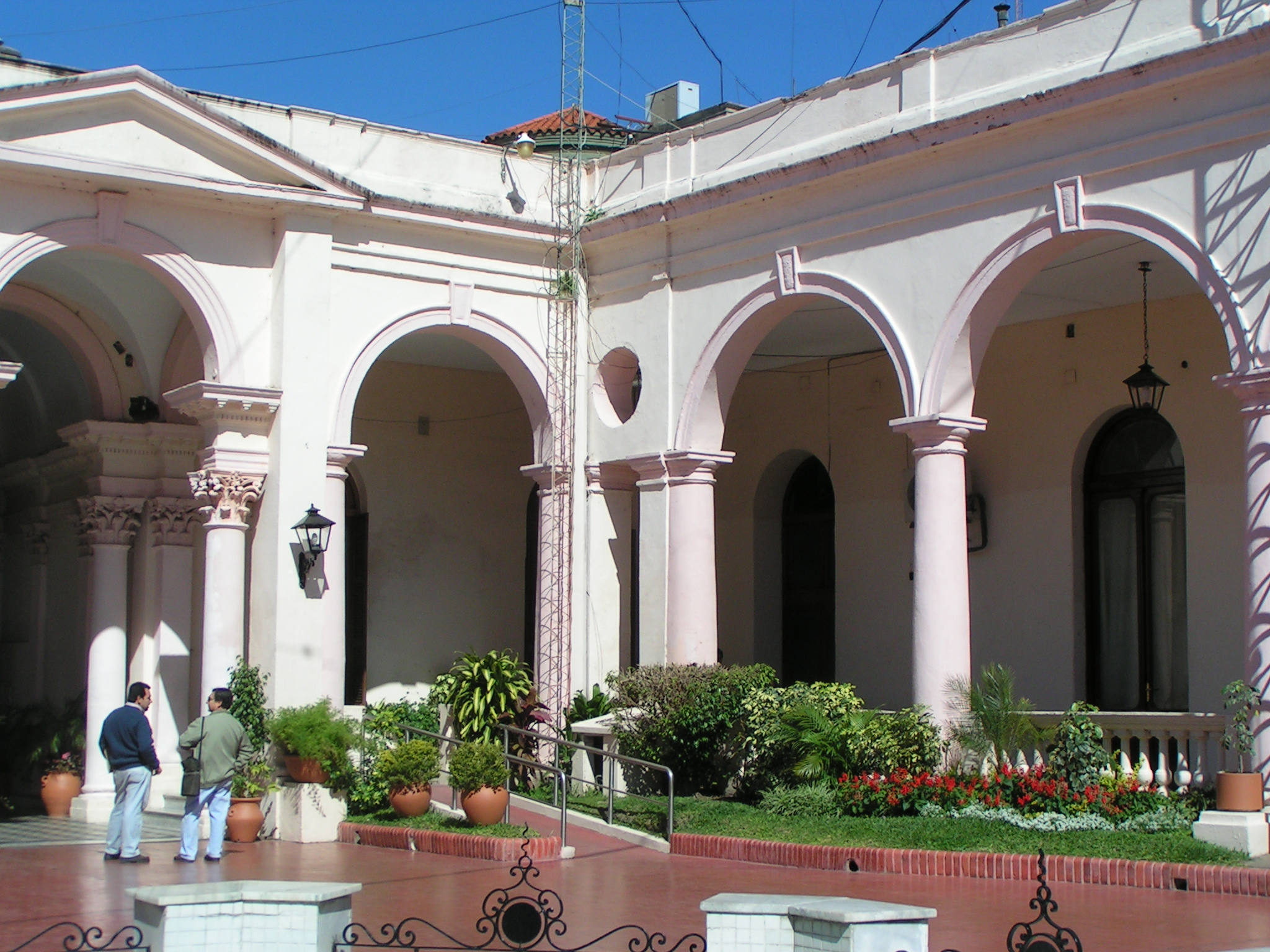 Patio interior, Casa de Gobierno, Corrientes.